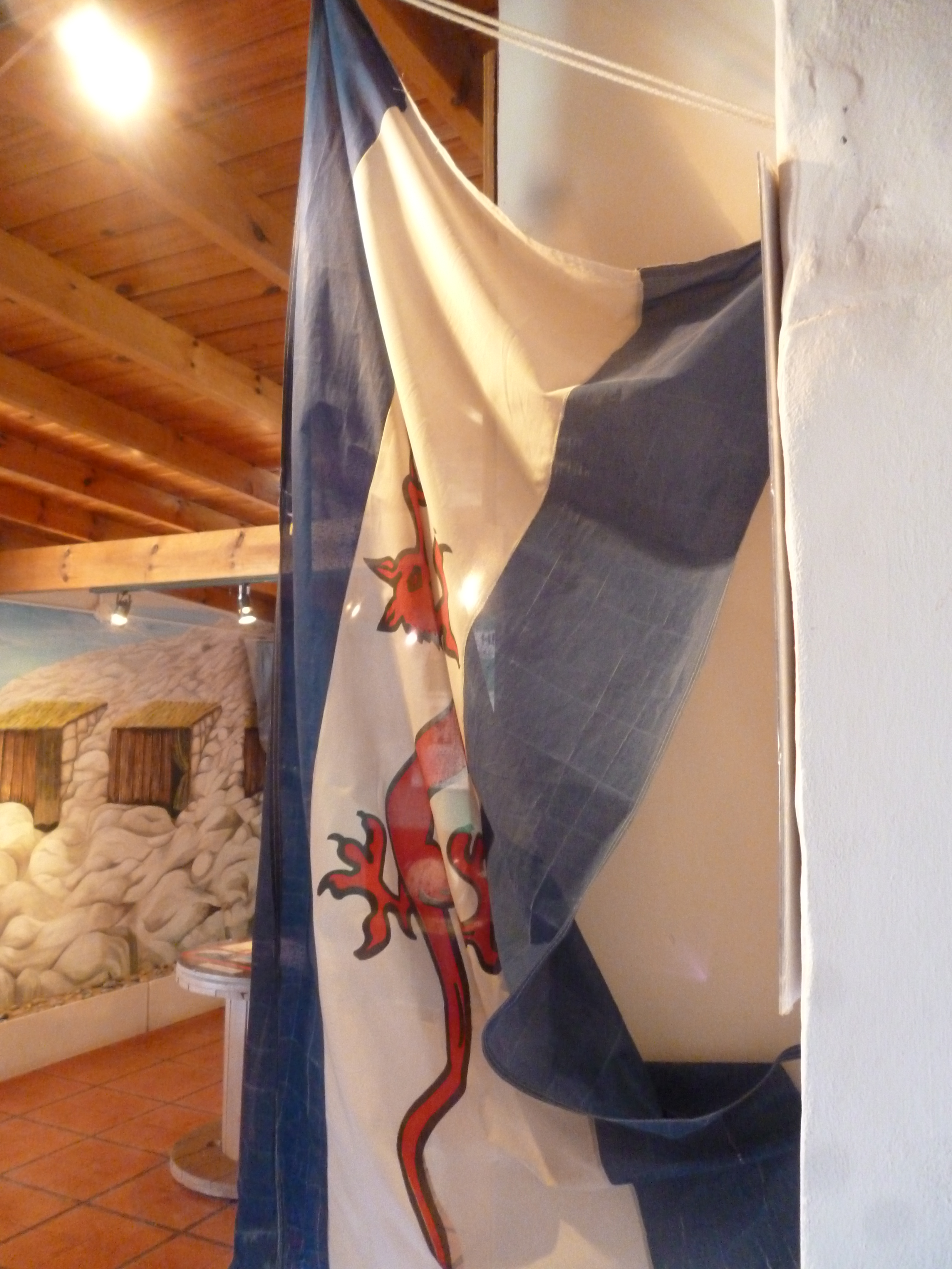 Flag of Y Wladfa